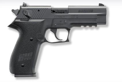 Для катаклизма.